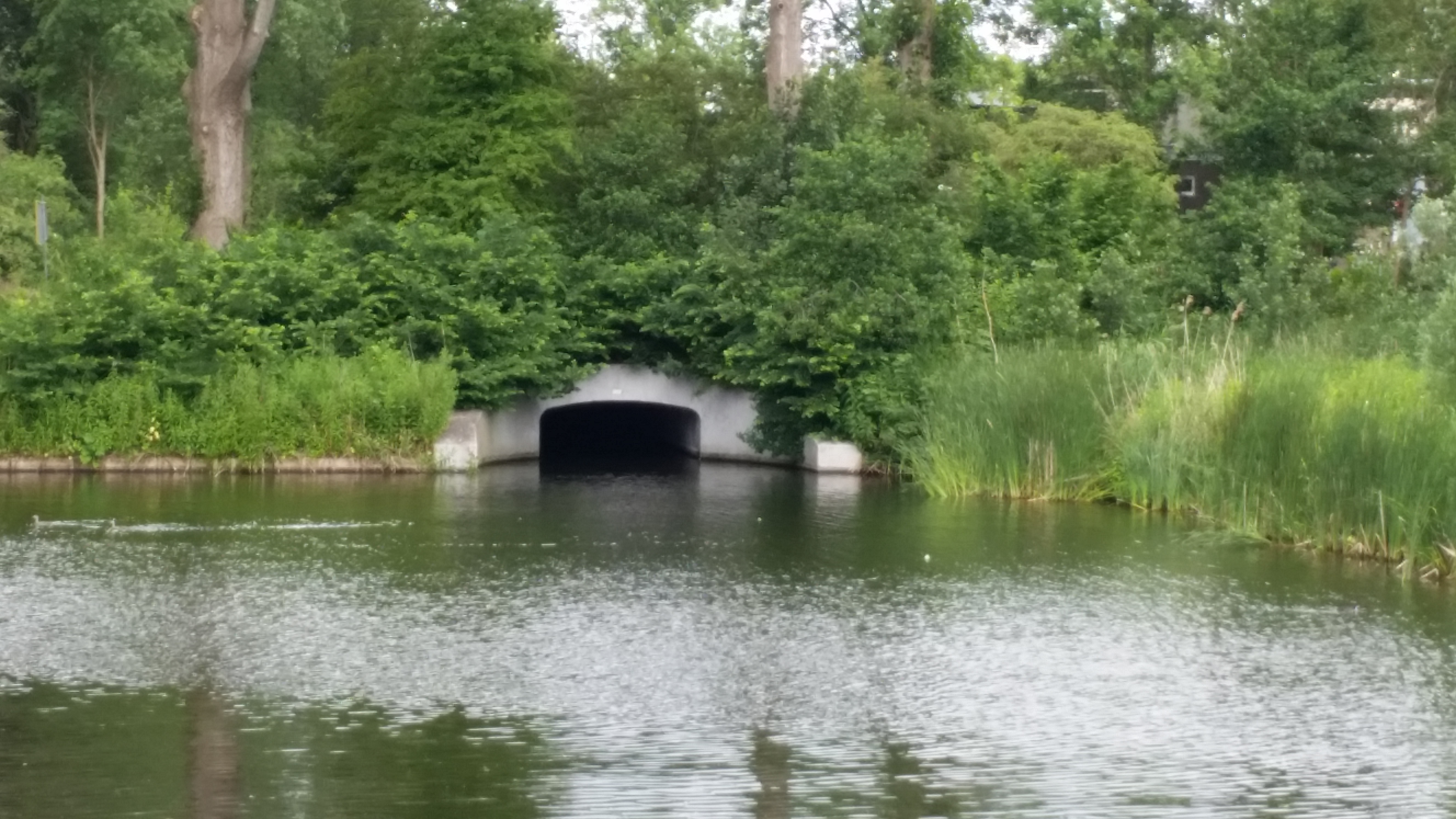 Brug 631 in de President Allendelaan in Amsterdam-Slotermeer